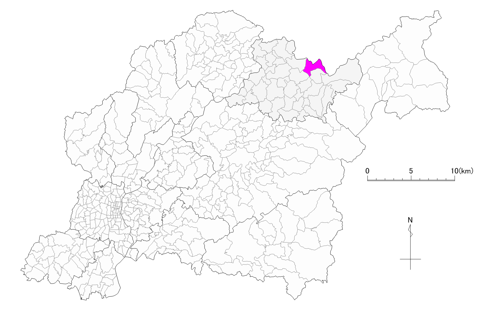 豊田市閑羅瀬町位置図